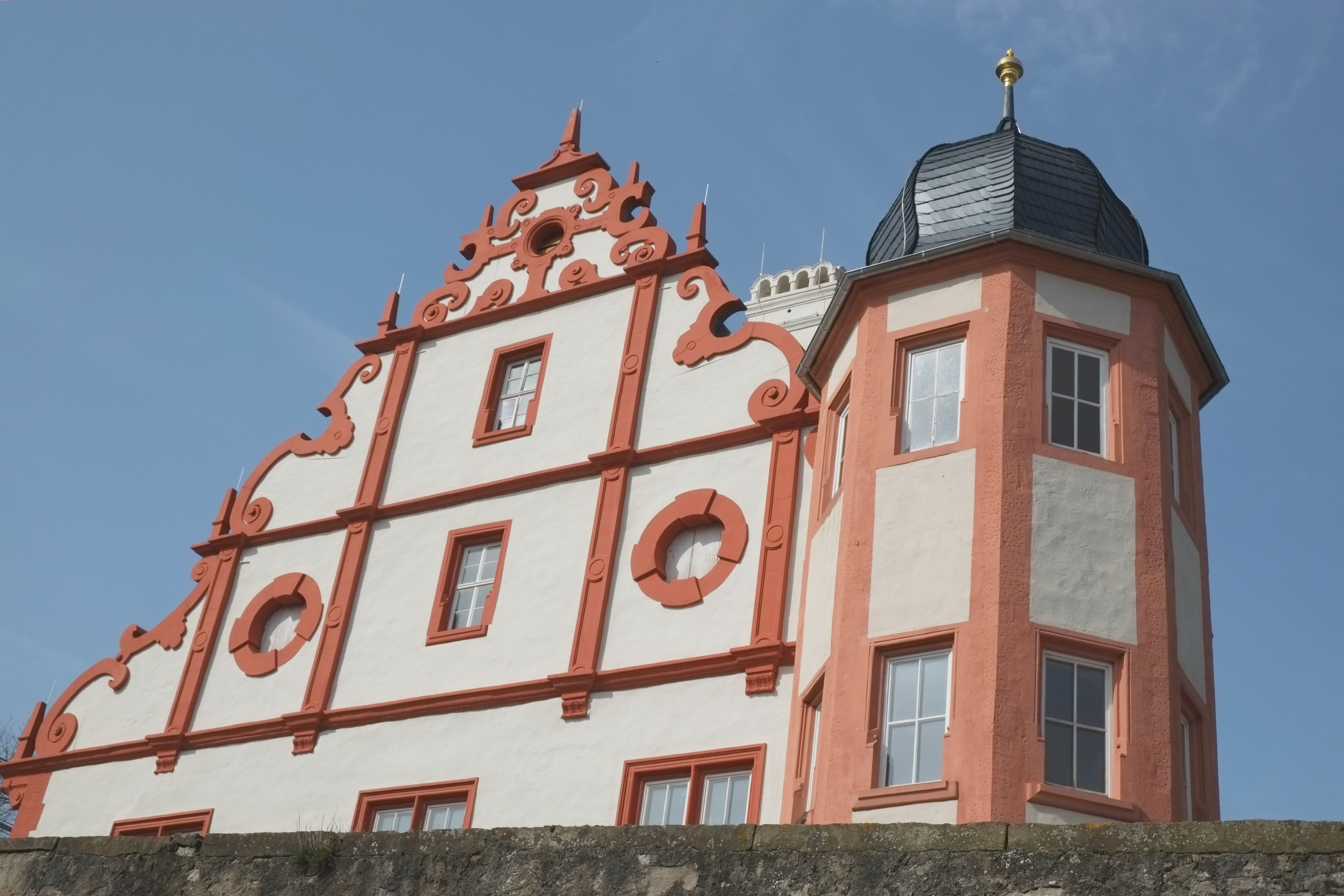 Ebracher Hof in Mainstockheim im Landkreis Kitzingen (Bayern, Deutschland)